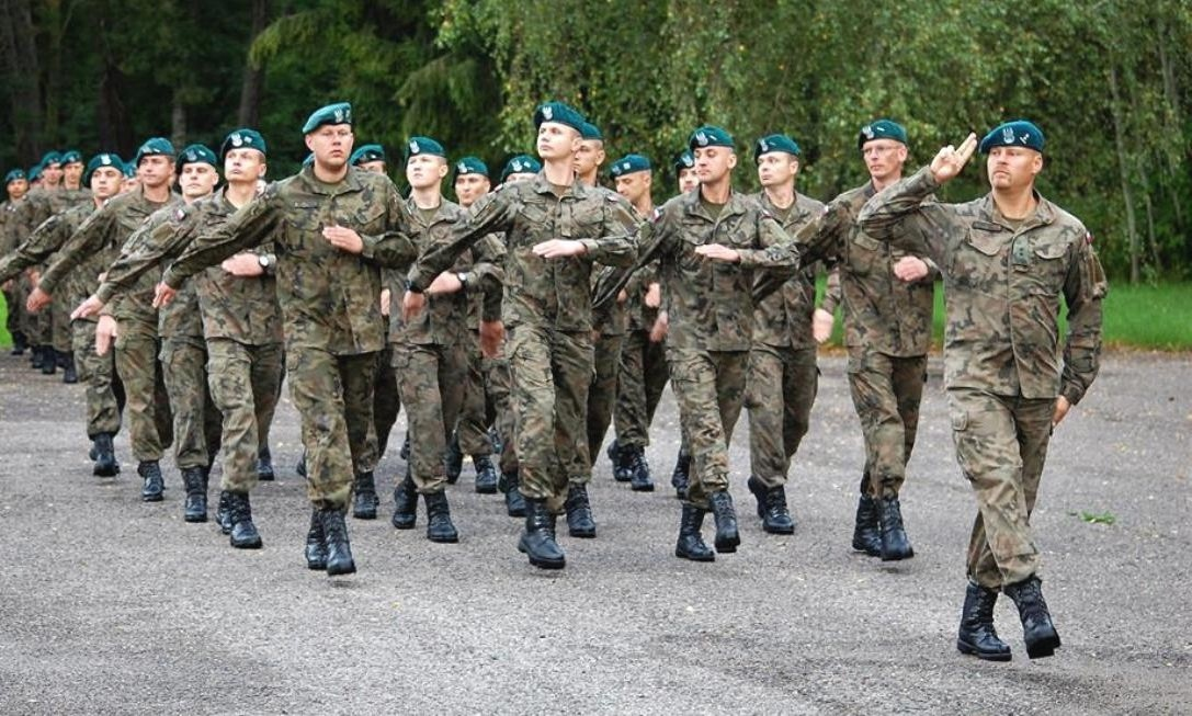 Bielkowo. 102 batalion ochrony